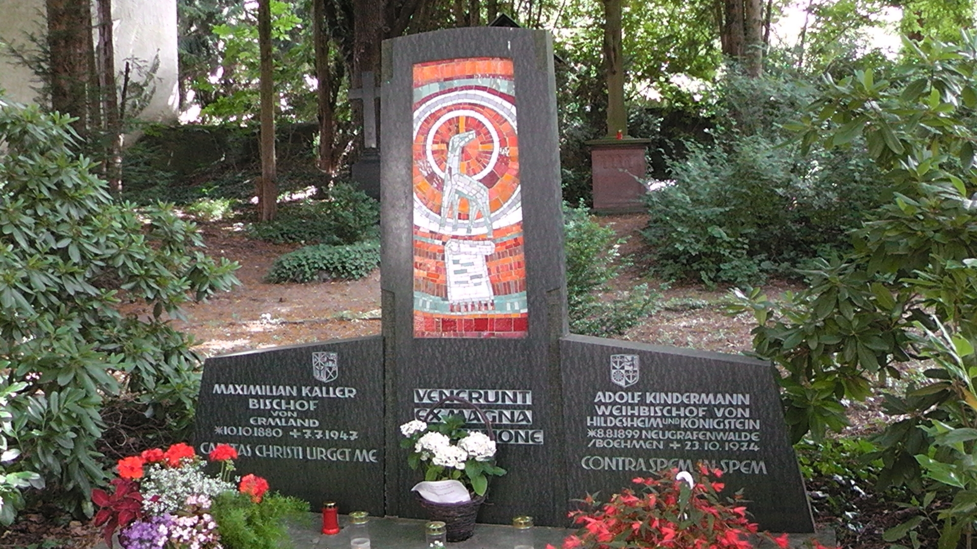 Das Grab Maximilian Kallers zusammen mit demjenigen des Weihbischofs Adolf Kindermann auf dem Friedhof der Katholischen Kirche St. Marien in Königstein im Taunus